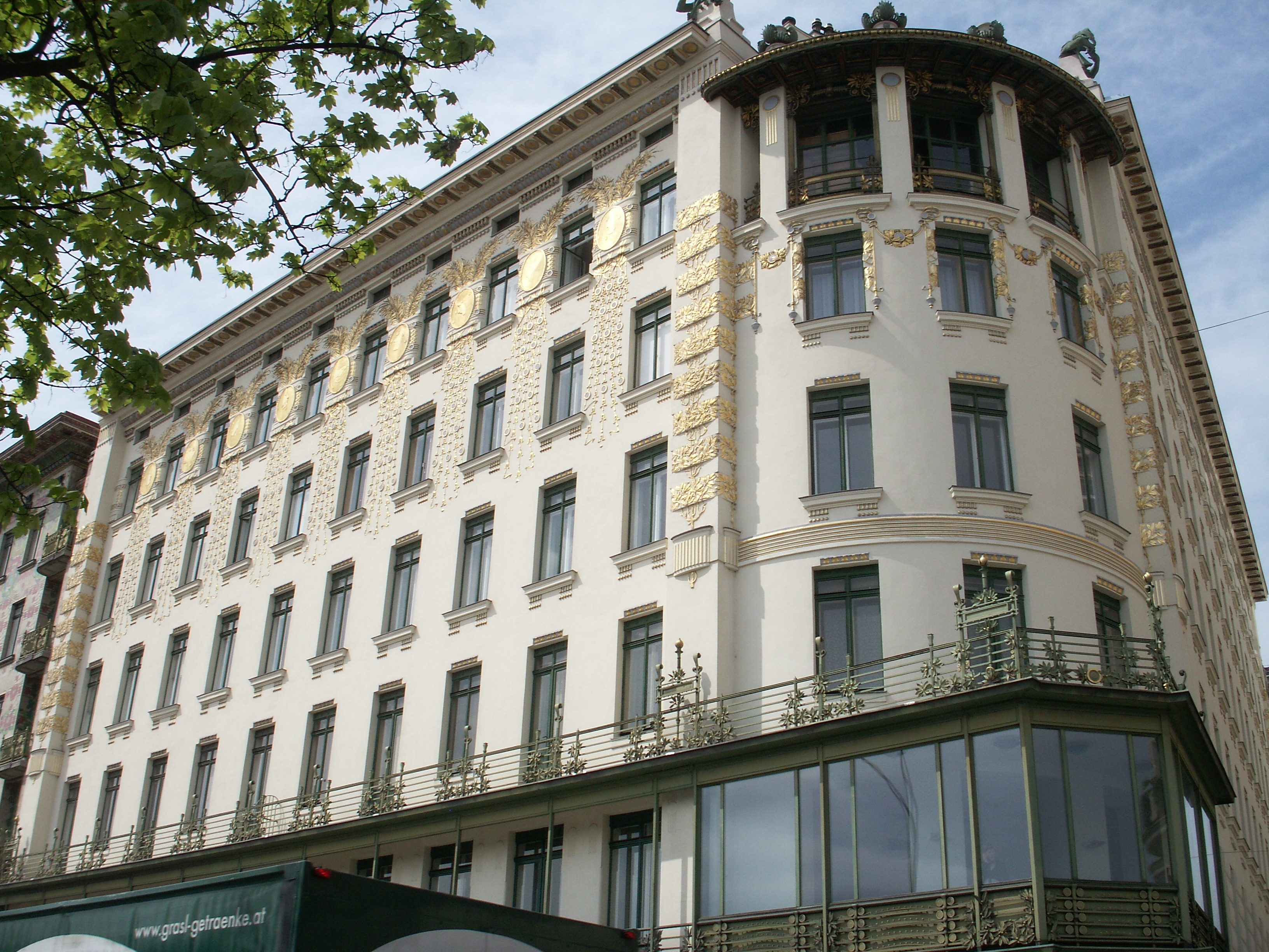 Wien, Wienzeile 38; Otto Wagner